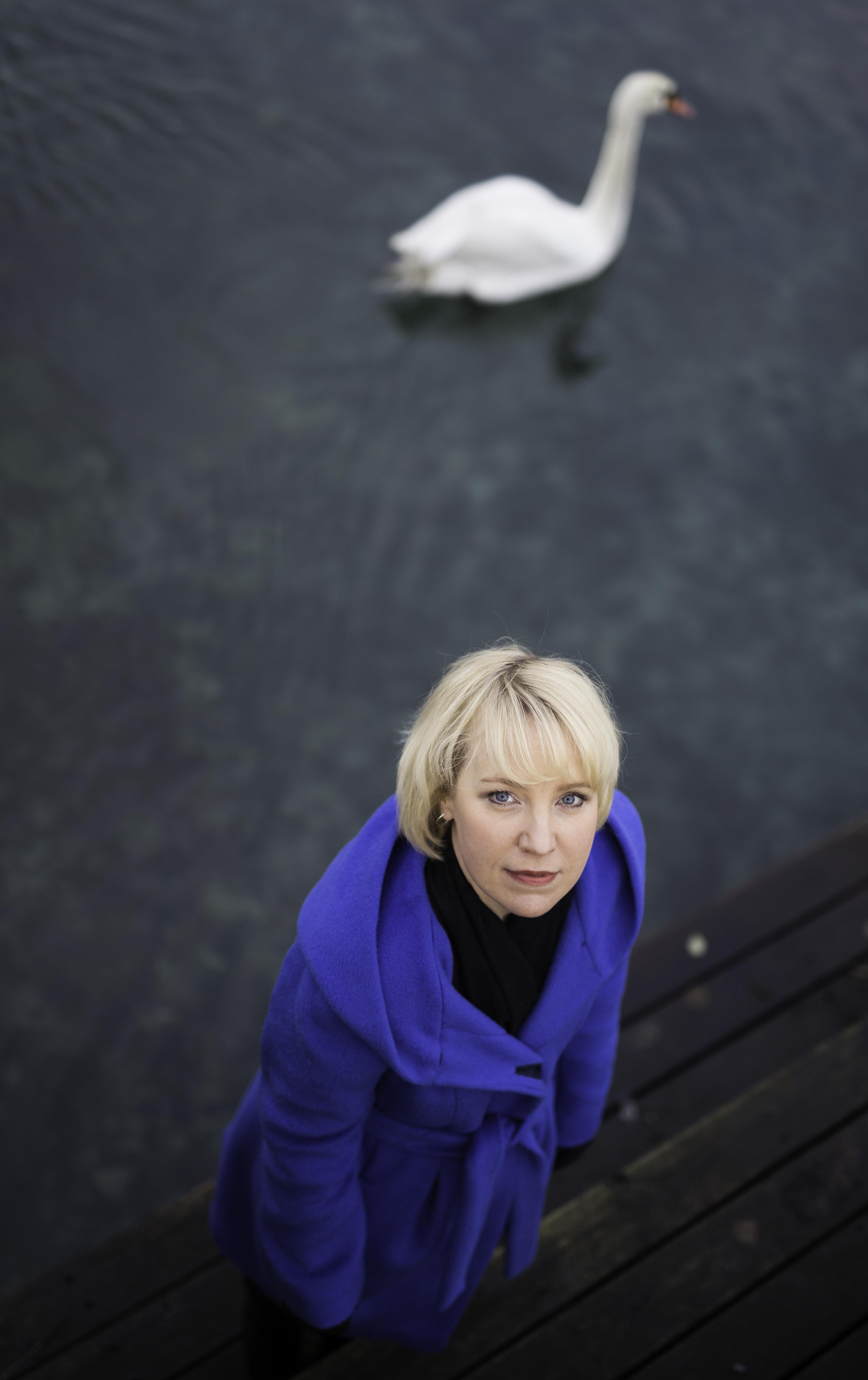 Kersti Ala-Murr